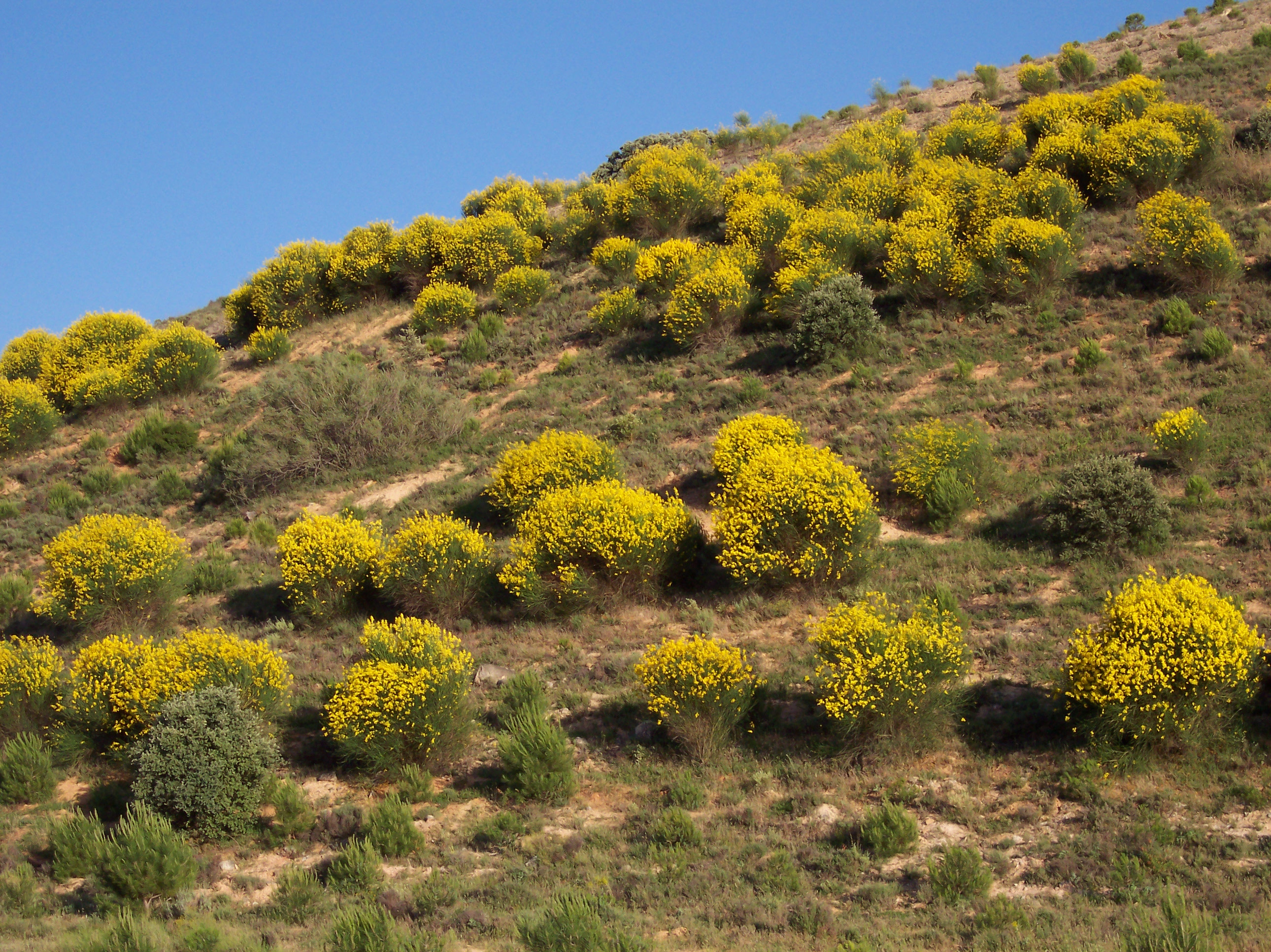 Spartium junceum. Real Jardín Botánico, Madrid.